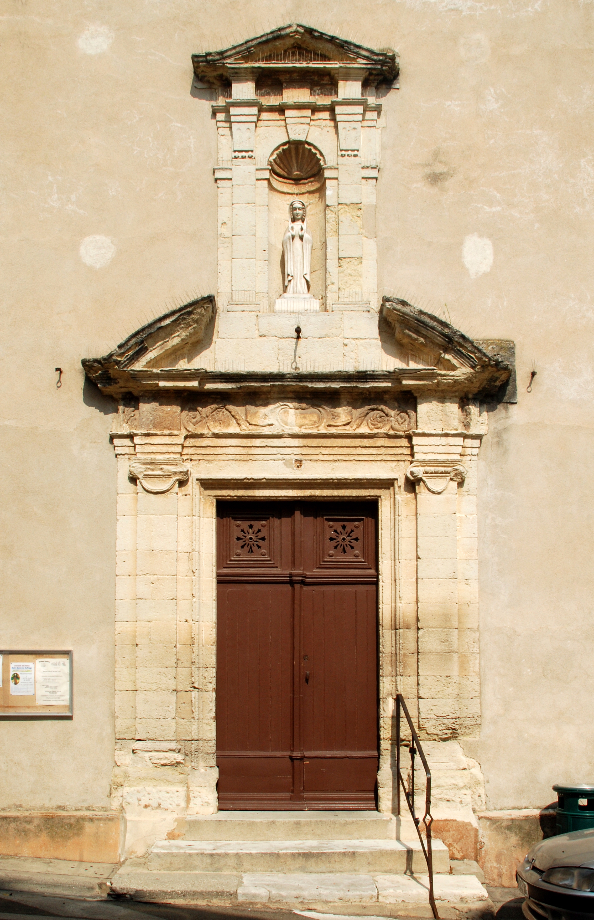 France - Gard - Église de Saint-Césaire-lès-Nîmes